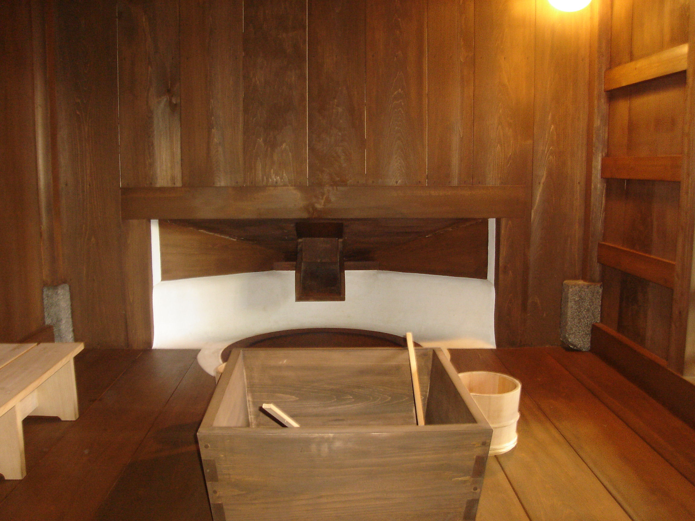 Syokokuji Senmyo , kyoto japan